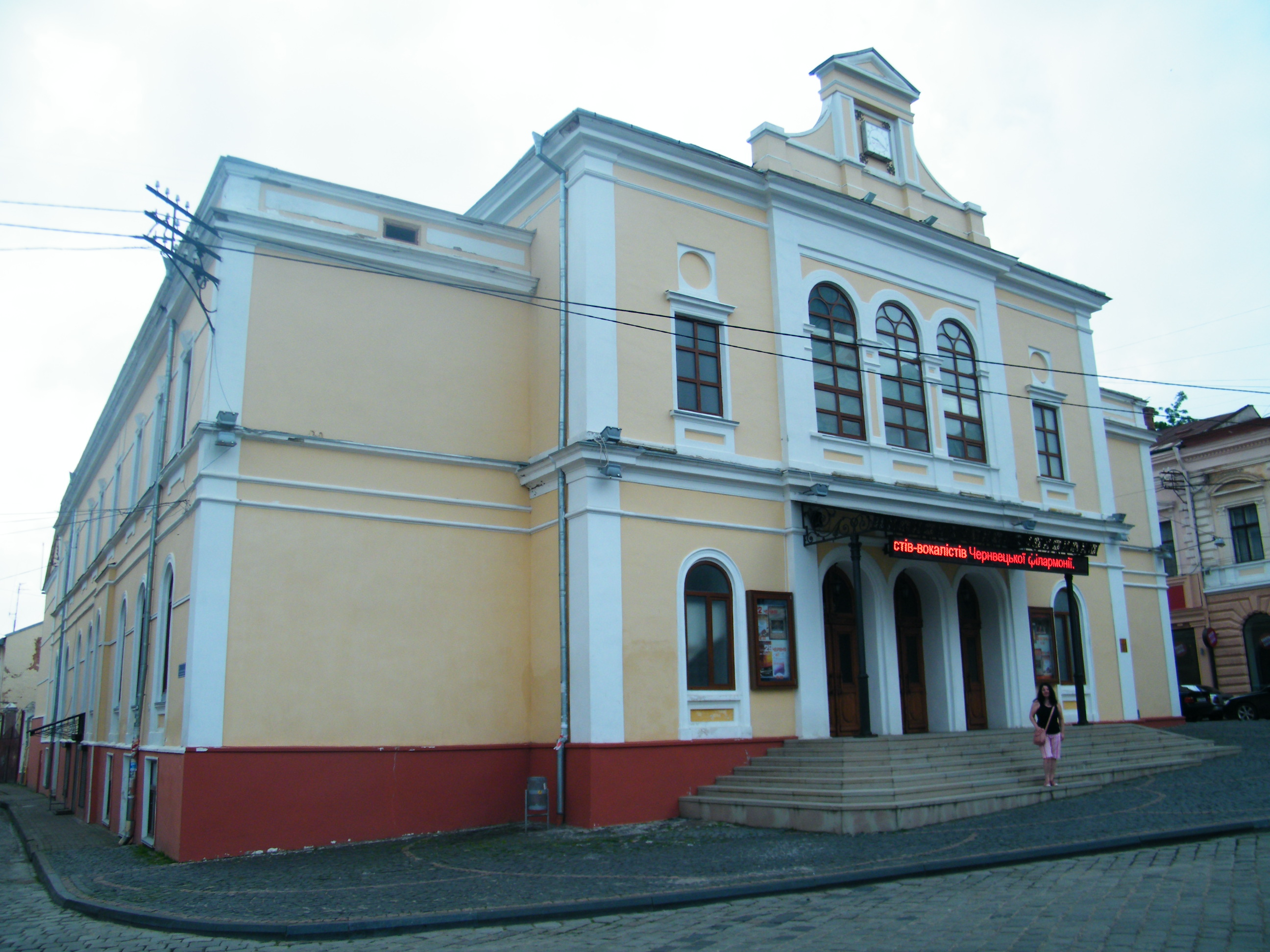 Філармонія, Чернівці